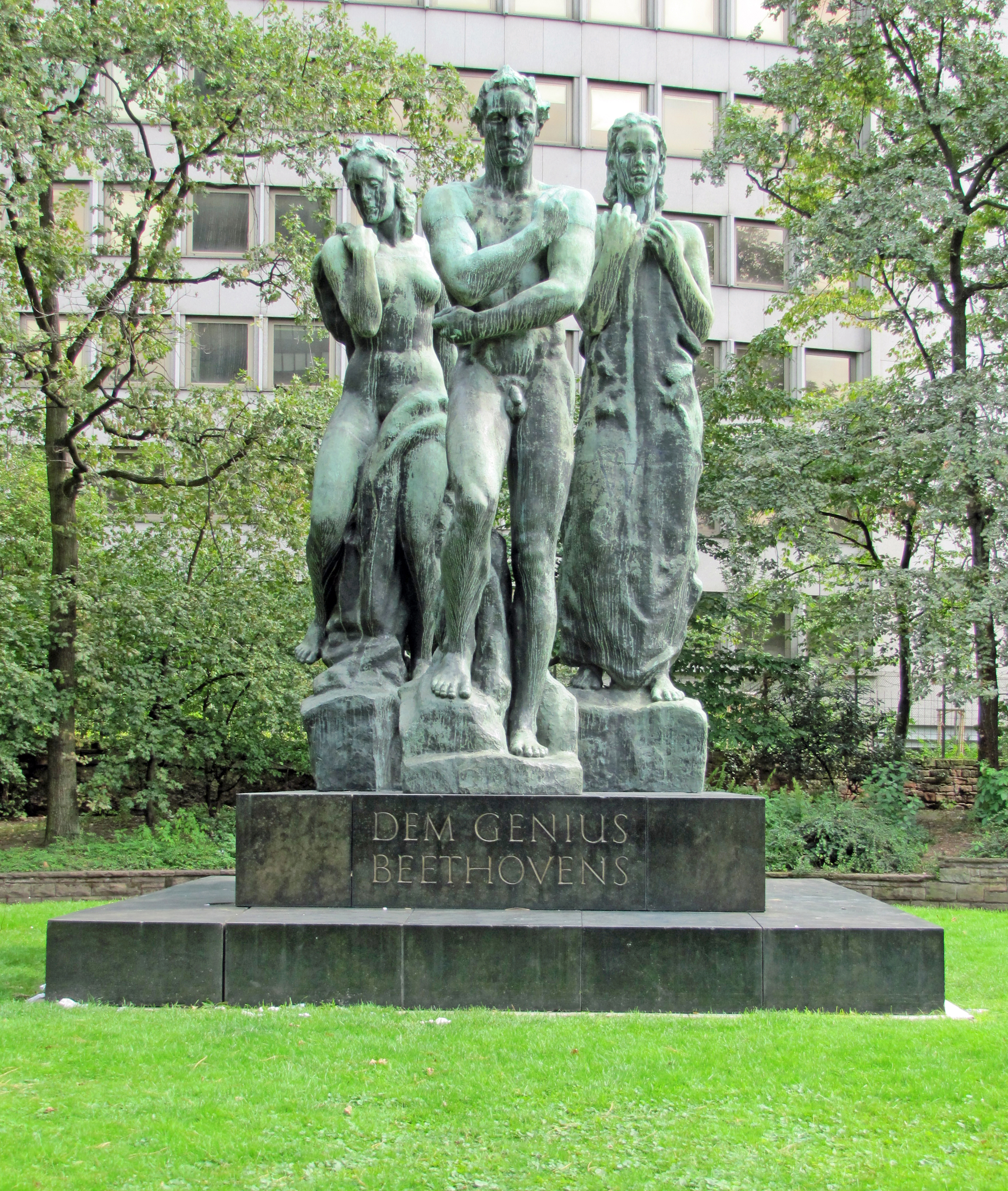 Beethoven-Denkmal, 1926-47, von Georg Kolbe, Bronze und Diabas, Taunusanlage, Ffm-Innenstadt